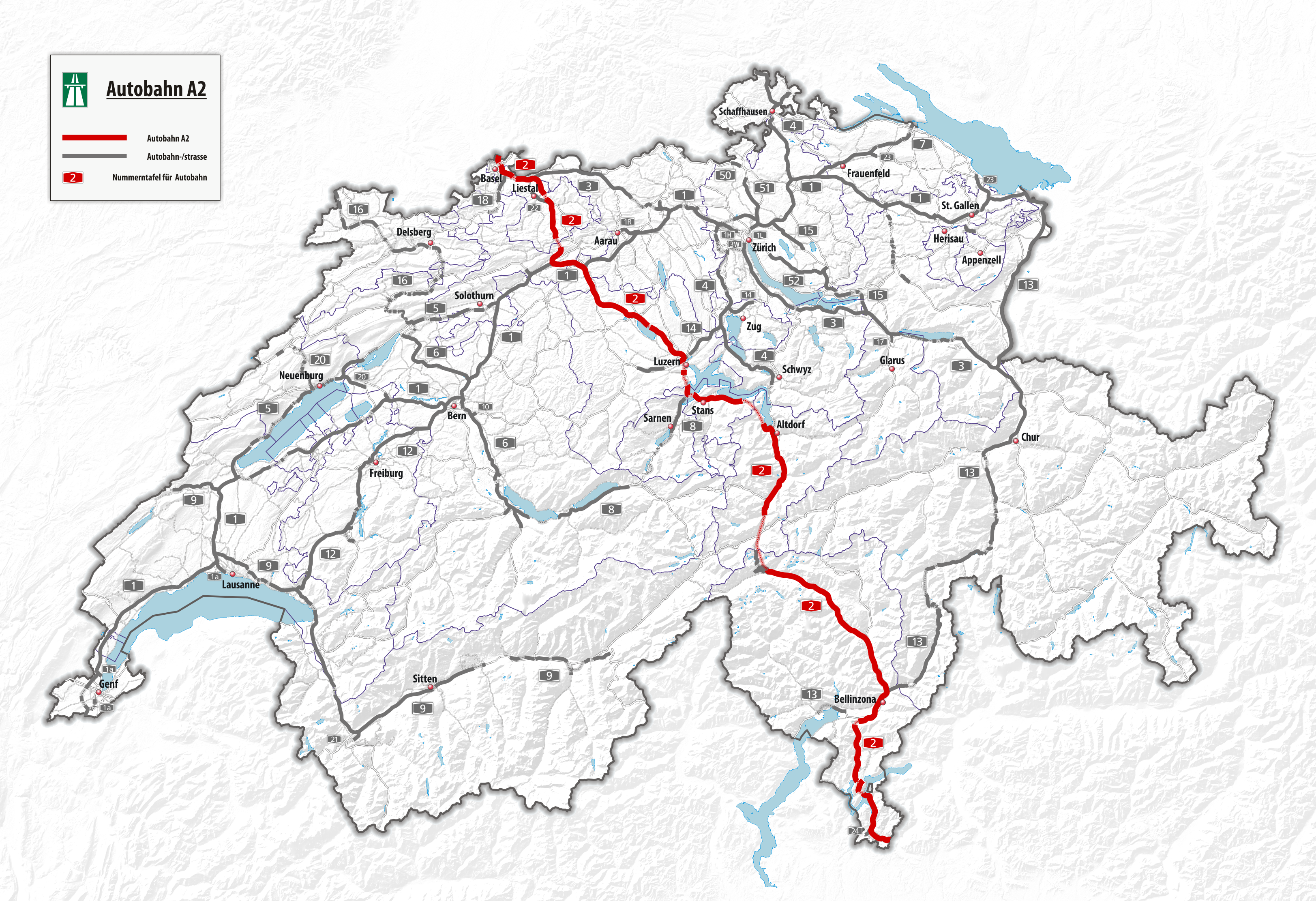 Autobahn A2 Stand 2018